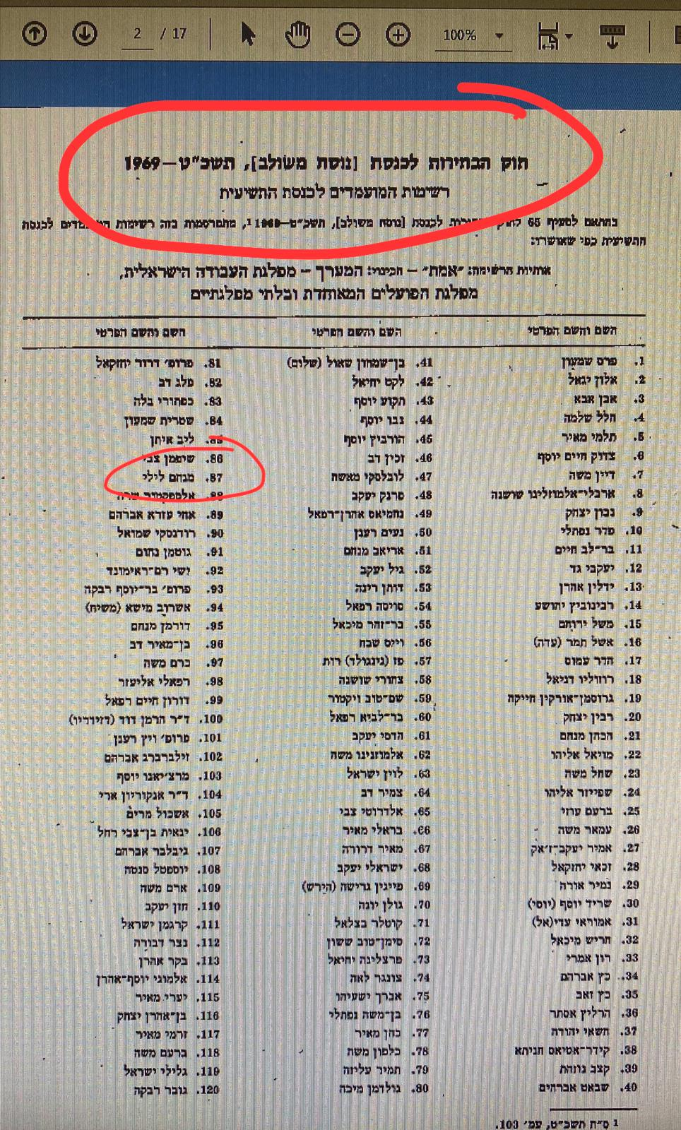 רשימת מועמדי "אמת" לכנסת התשיעית בה מופיע שמה של לילי מנחם